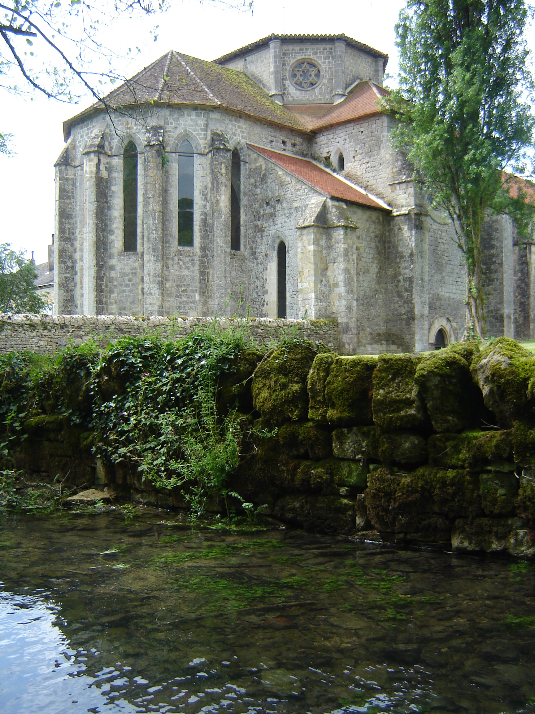 Abbaye vue de l'arrière au bord du ruisseau aménagé